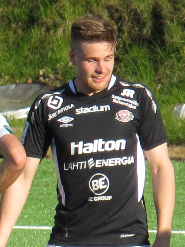 Henri Toivomäki, suomalainen jalkapalloilija FC Lahden joukkueessa kaudella 2015.